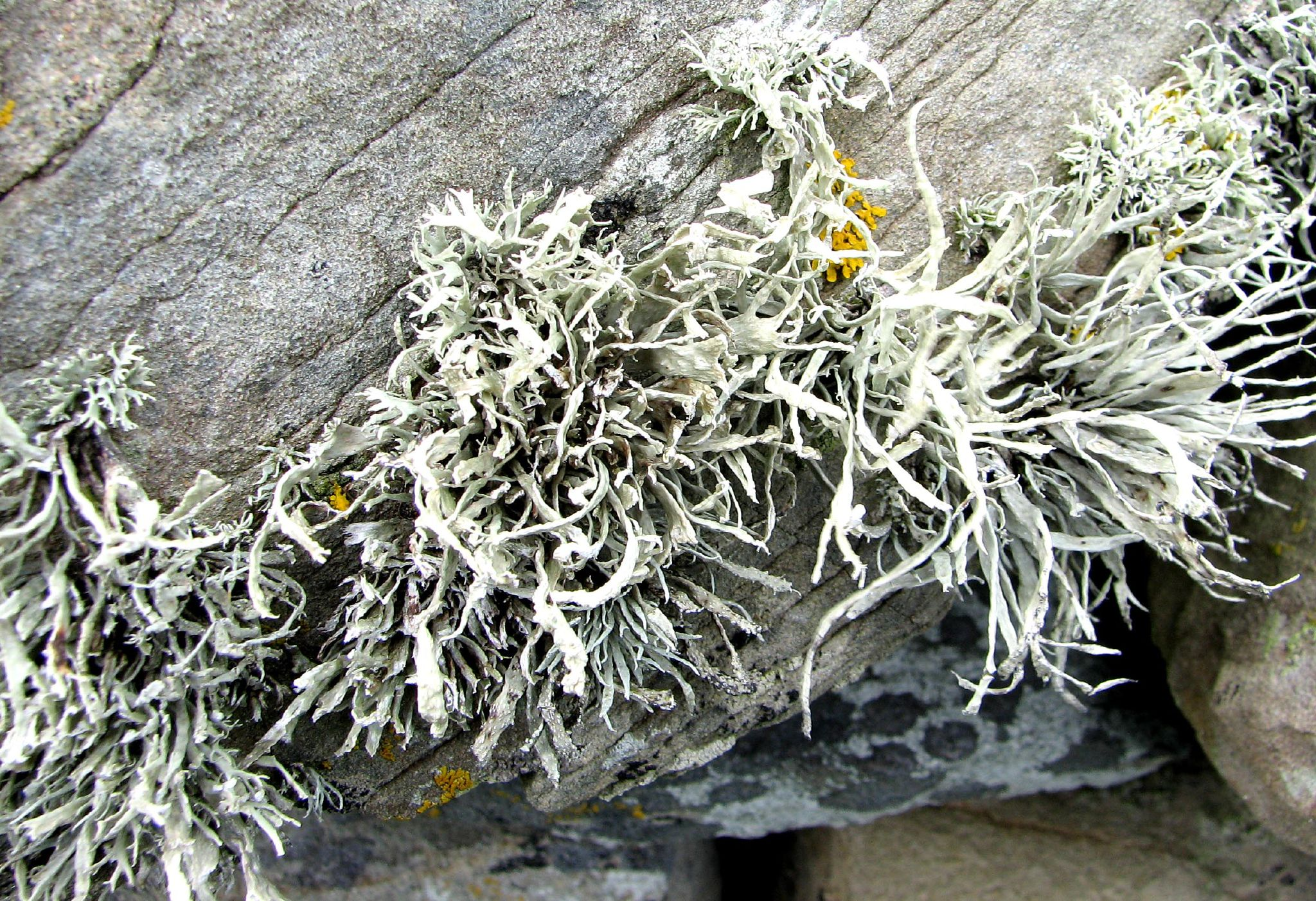 Lichens 02